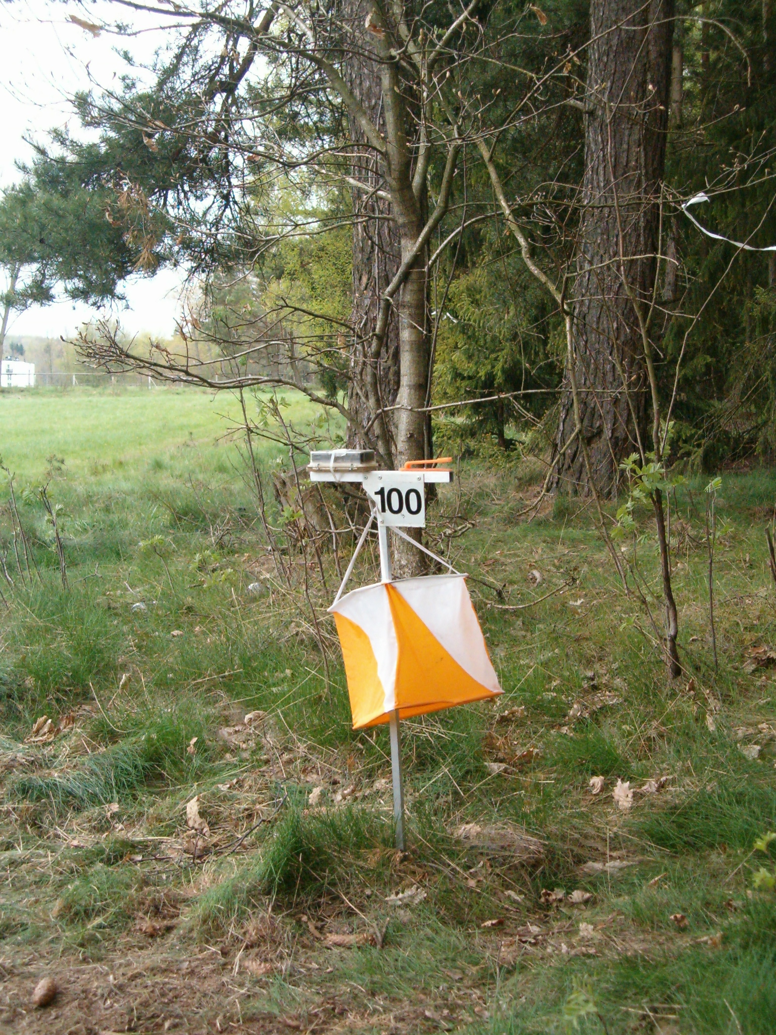 Control point.